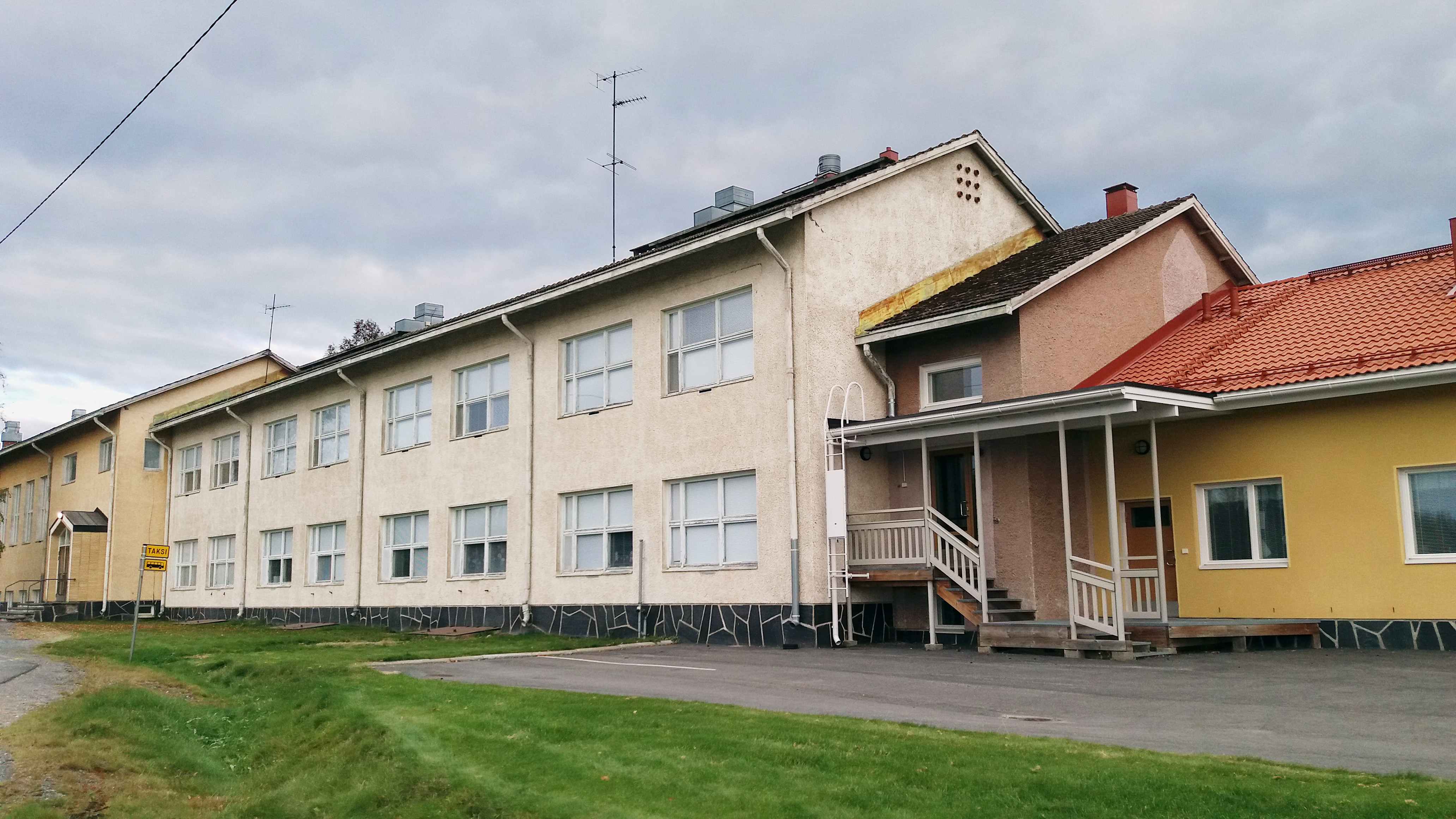 Iisveden koulu, Suonenjoki.